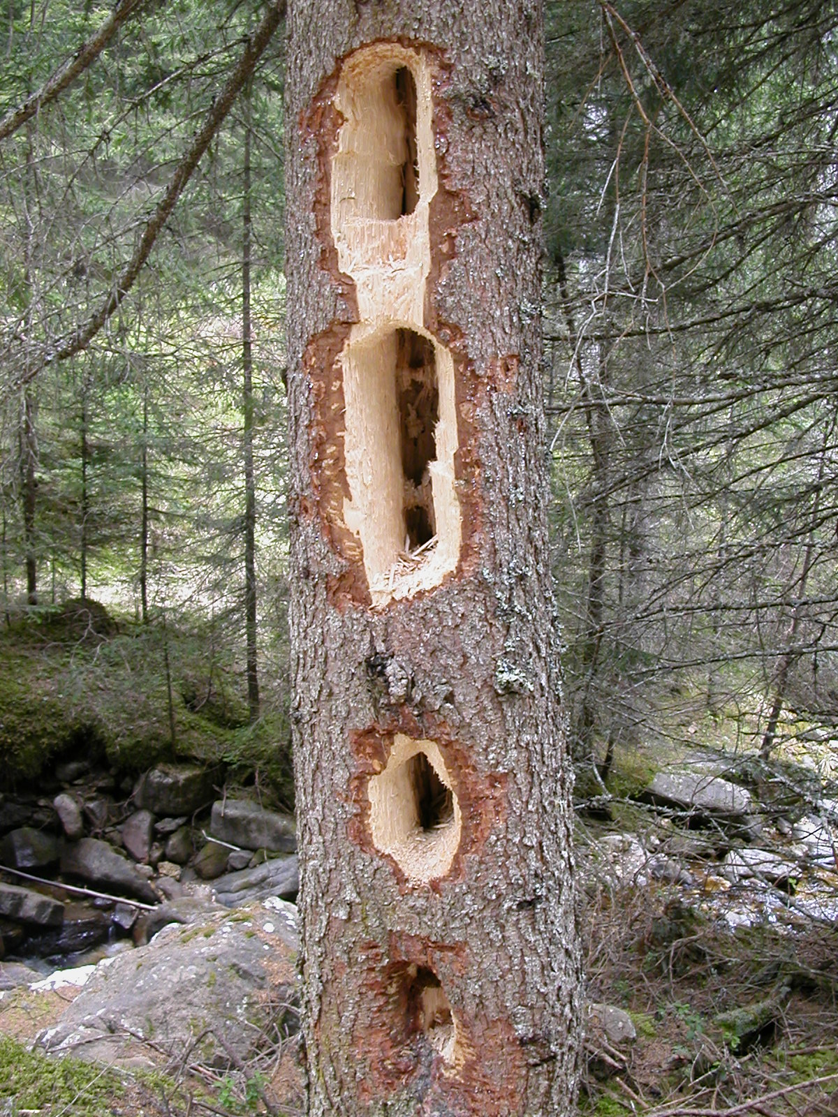 Passo Nigra - Cavità scavate da Dryocopus martius